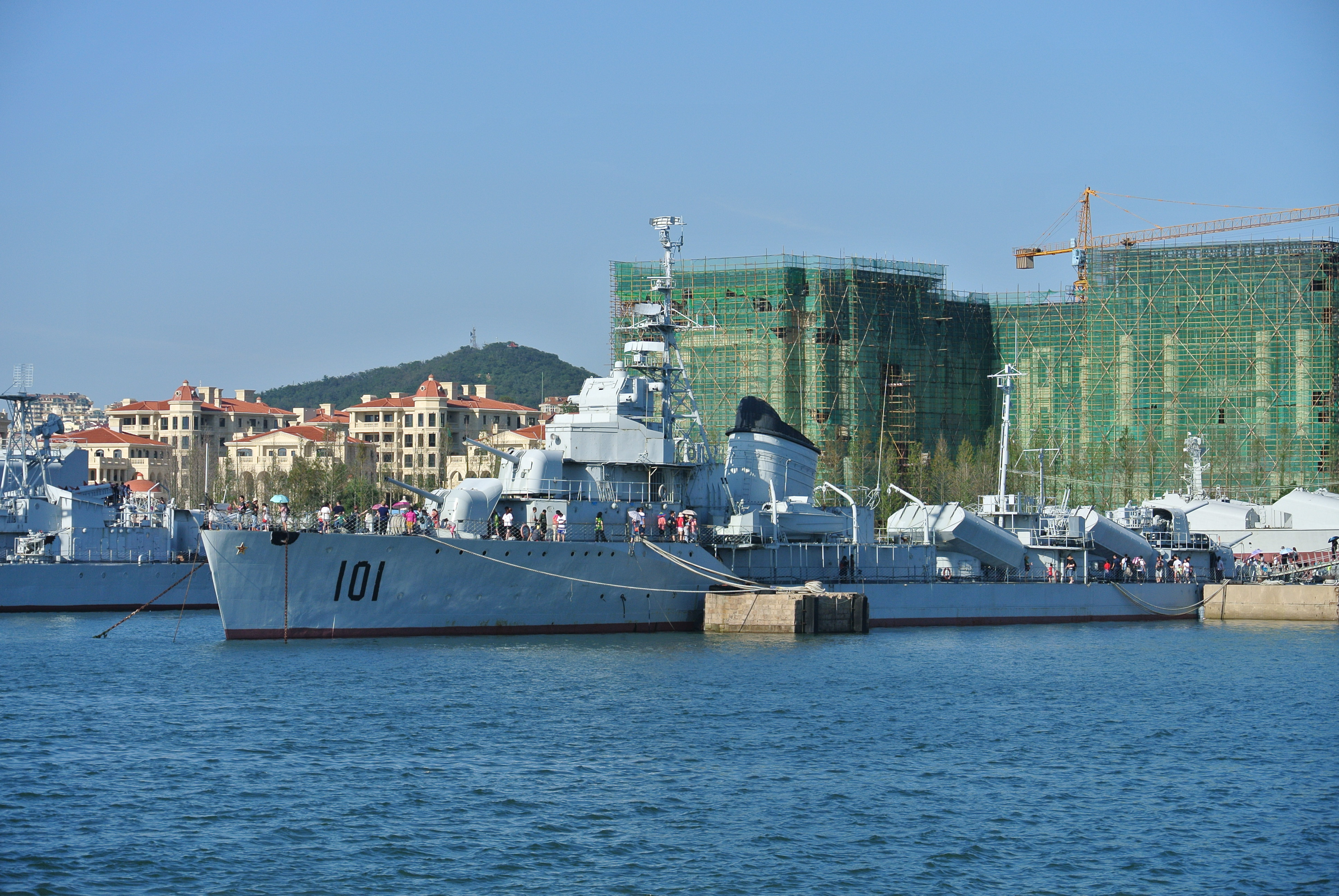 青岛中国海军博物馆鞍山号驱逐舰